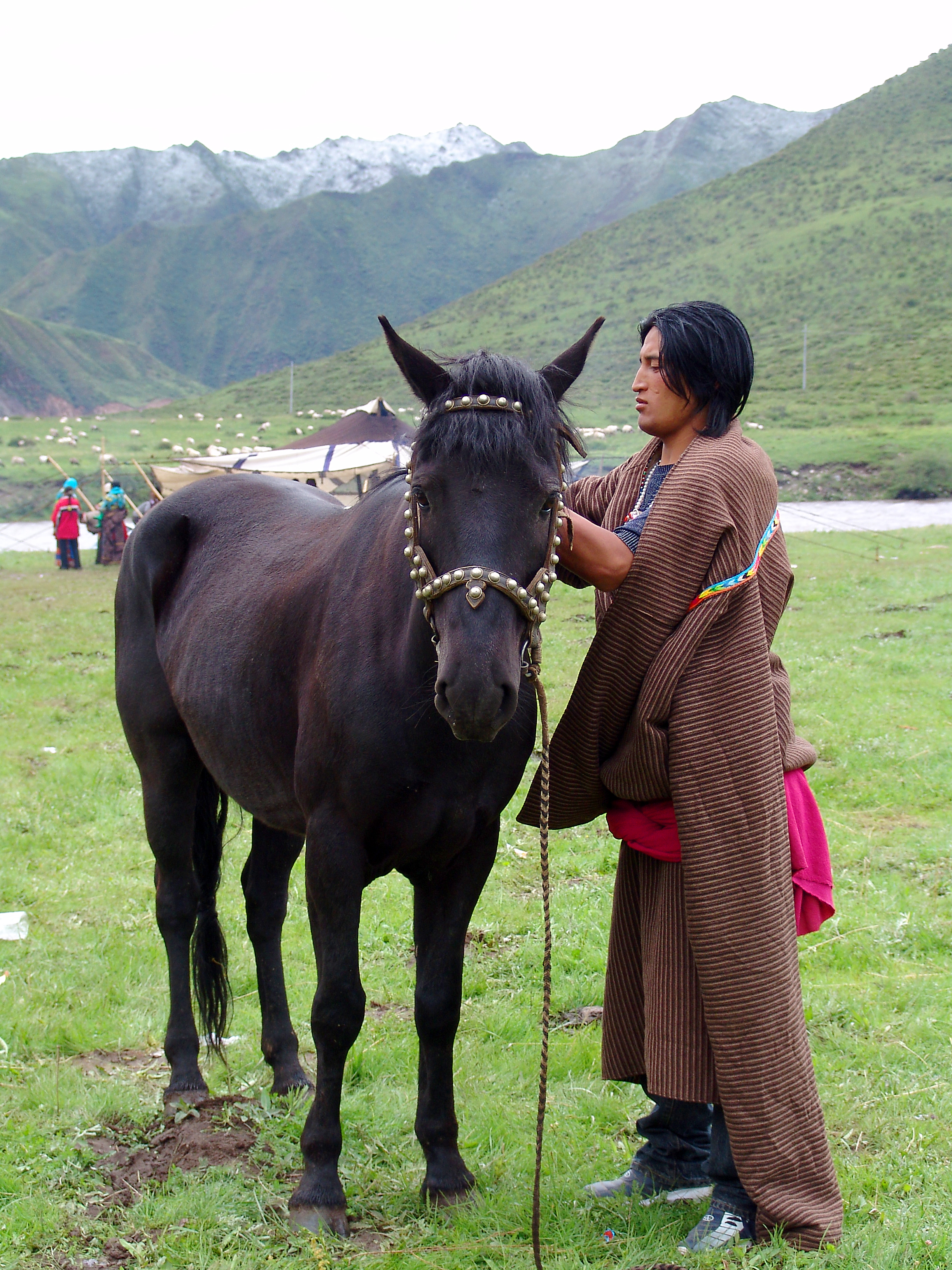 Un homme et son cheval dans la région de Gansu, en chine.